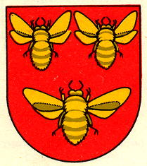 Wappen von Sarzens Kanton Waadt Schweiz